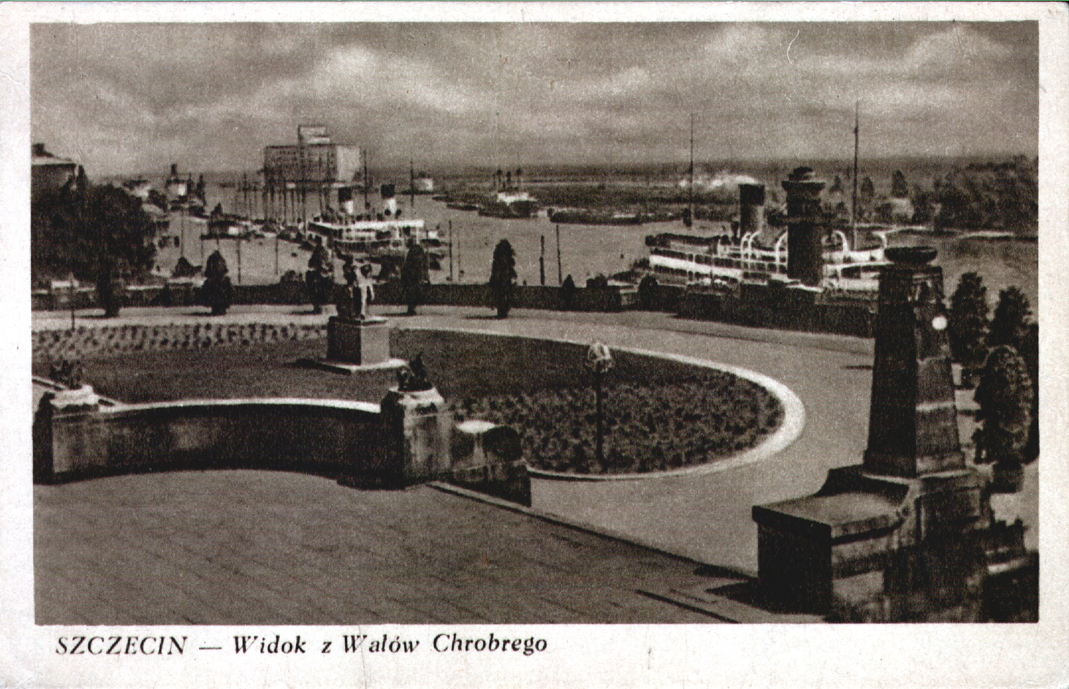 Szczecin na starej fotografii